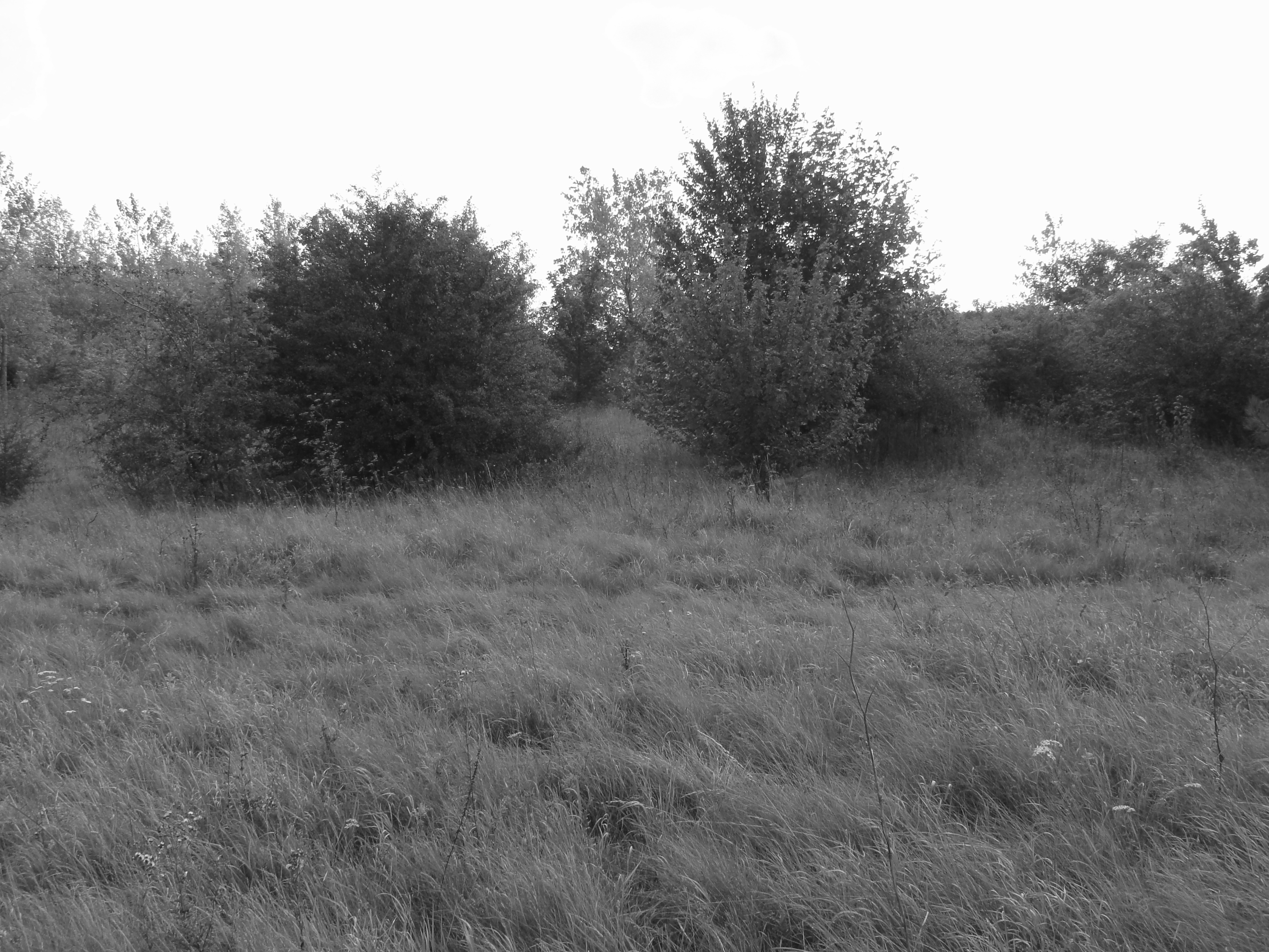 Terril n° 224 dit 12 de Béthune, Fosse n° 12 de la Compagnie des mines de Béthune, Annequin, Pas-de-Calais, Nord-Pas-de-Calais, France.